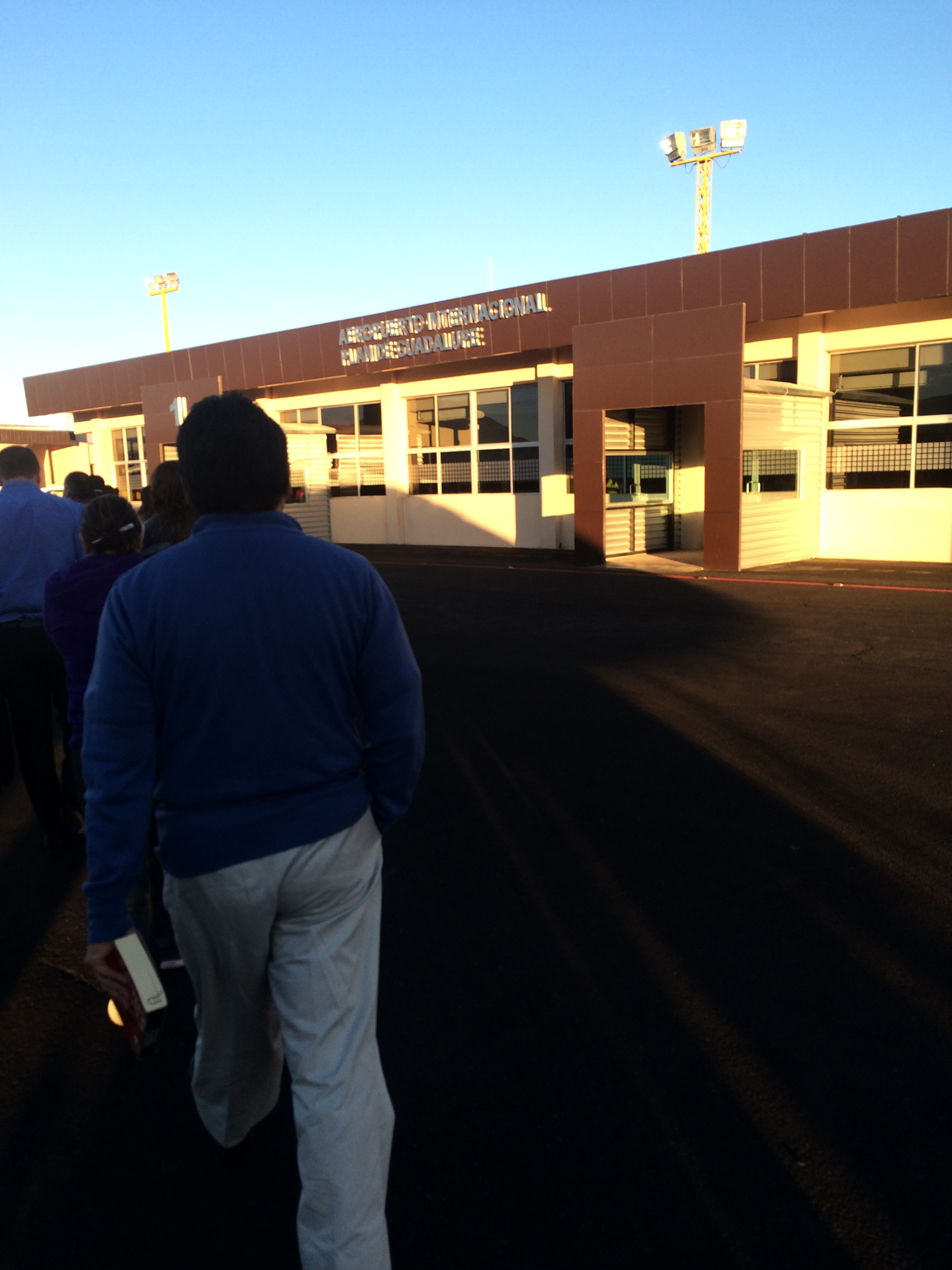 Lado aire del Aeropuerto Internacional de Saltillo.